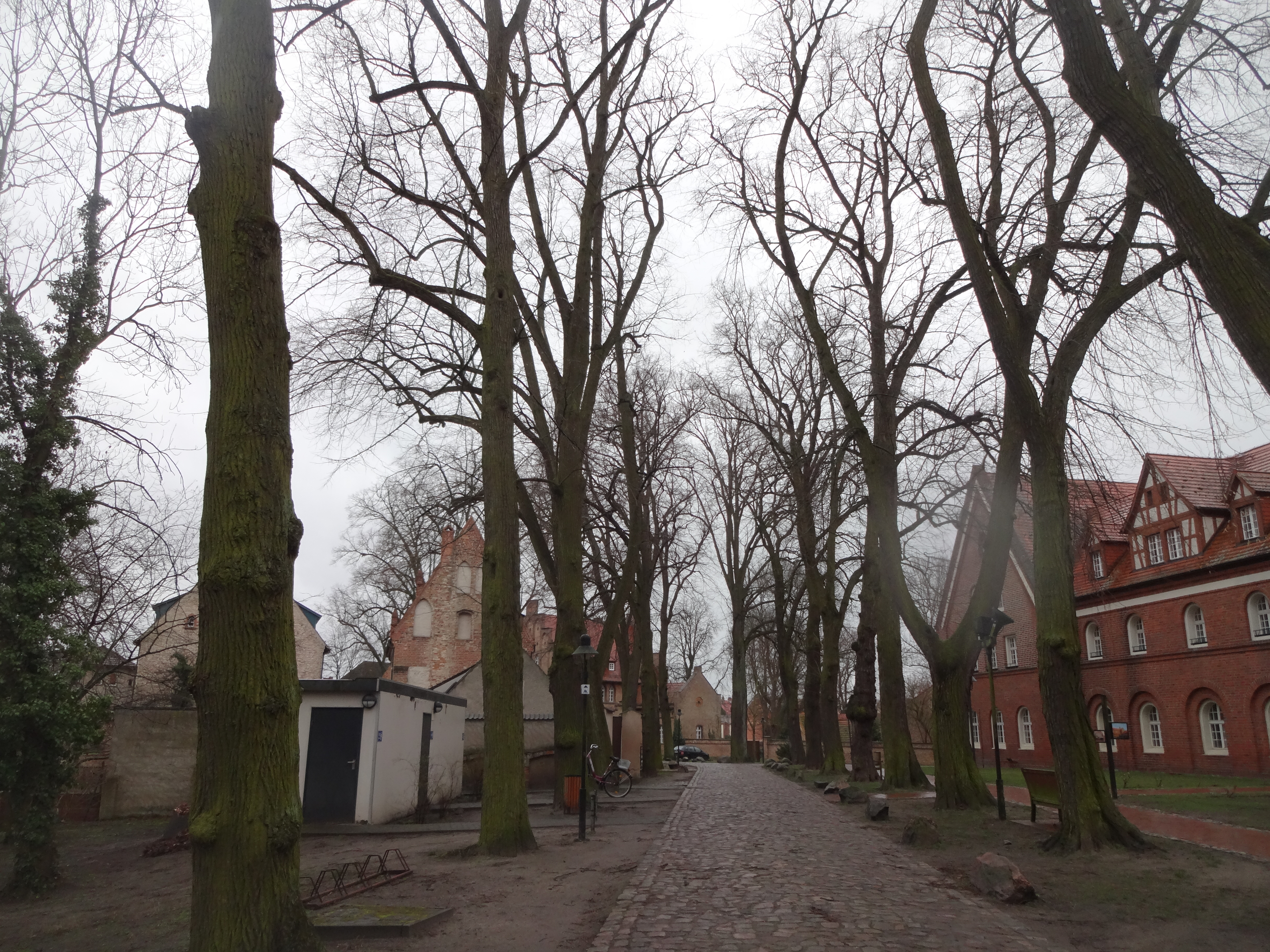 Teil einer Lindengruppe aus 38 Linden im Bereich des Kloster Lehnin